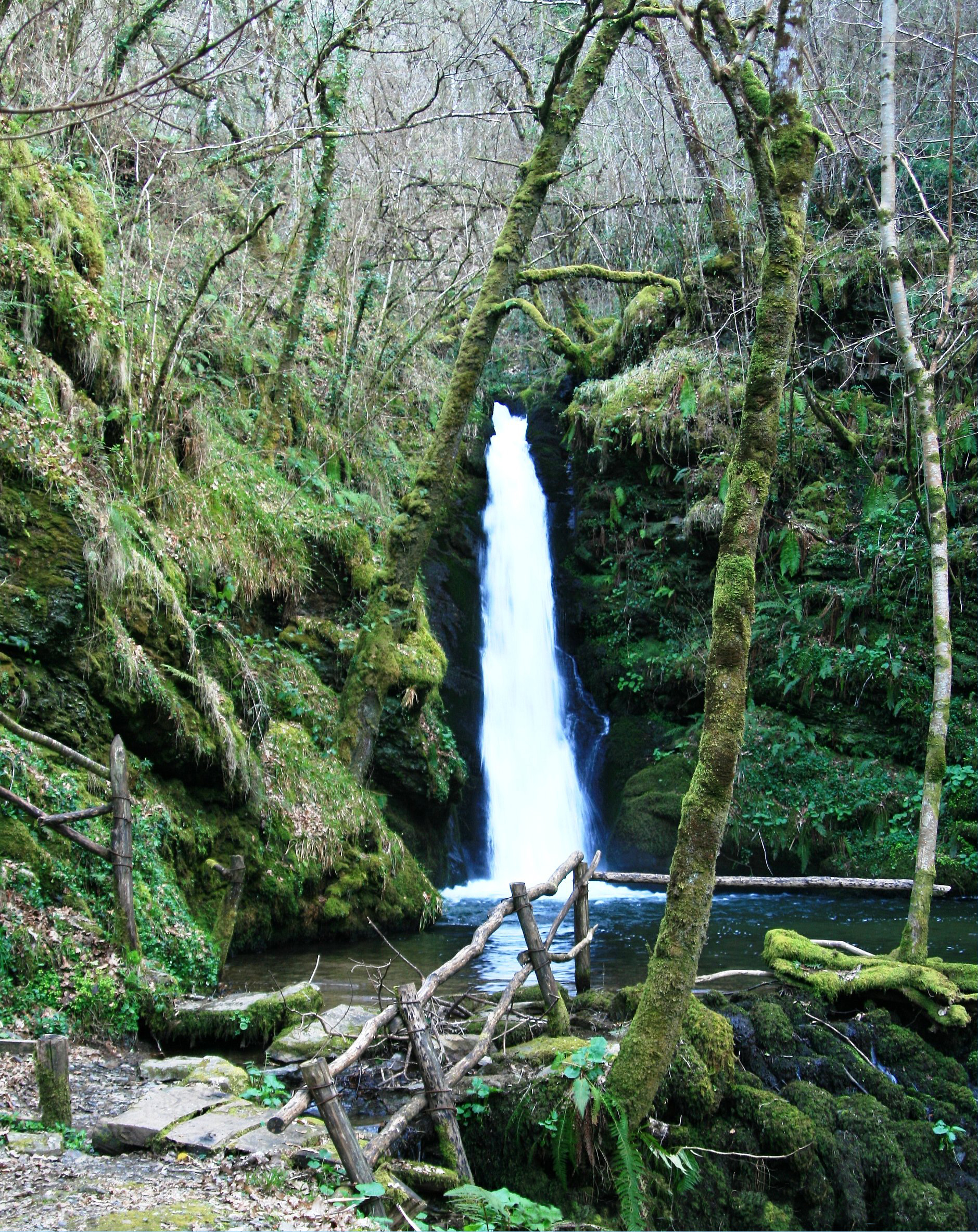 Seimeira ou Fervenza de Queixoiro, A Fonsagrada